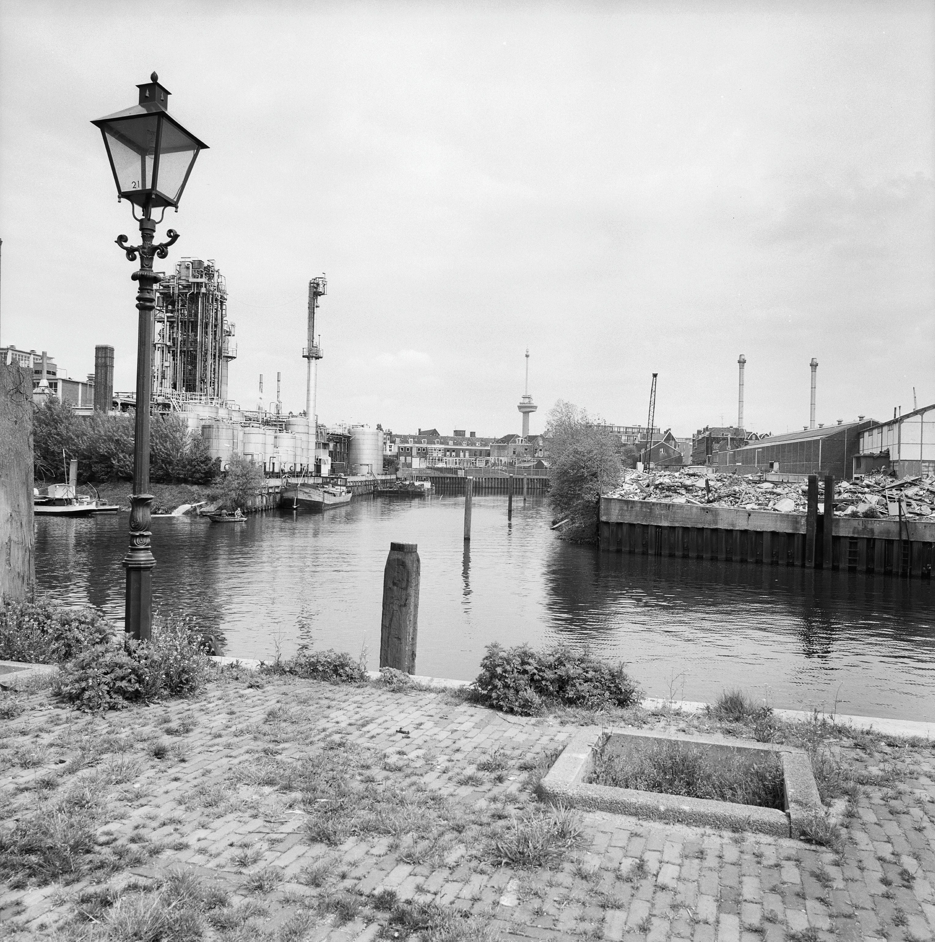 Overzichten: Buizenwaal